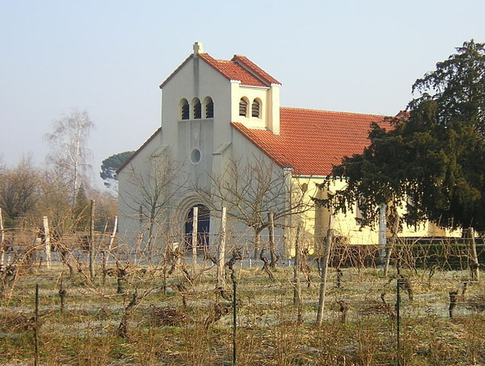 église de Lahosse vue de la vigne de Mora.